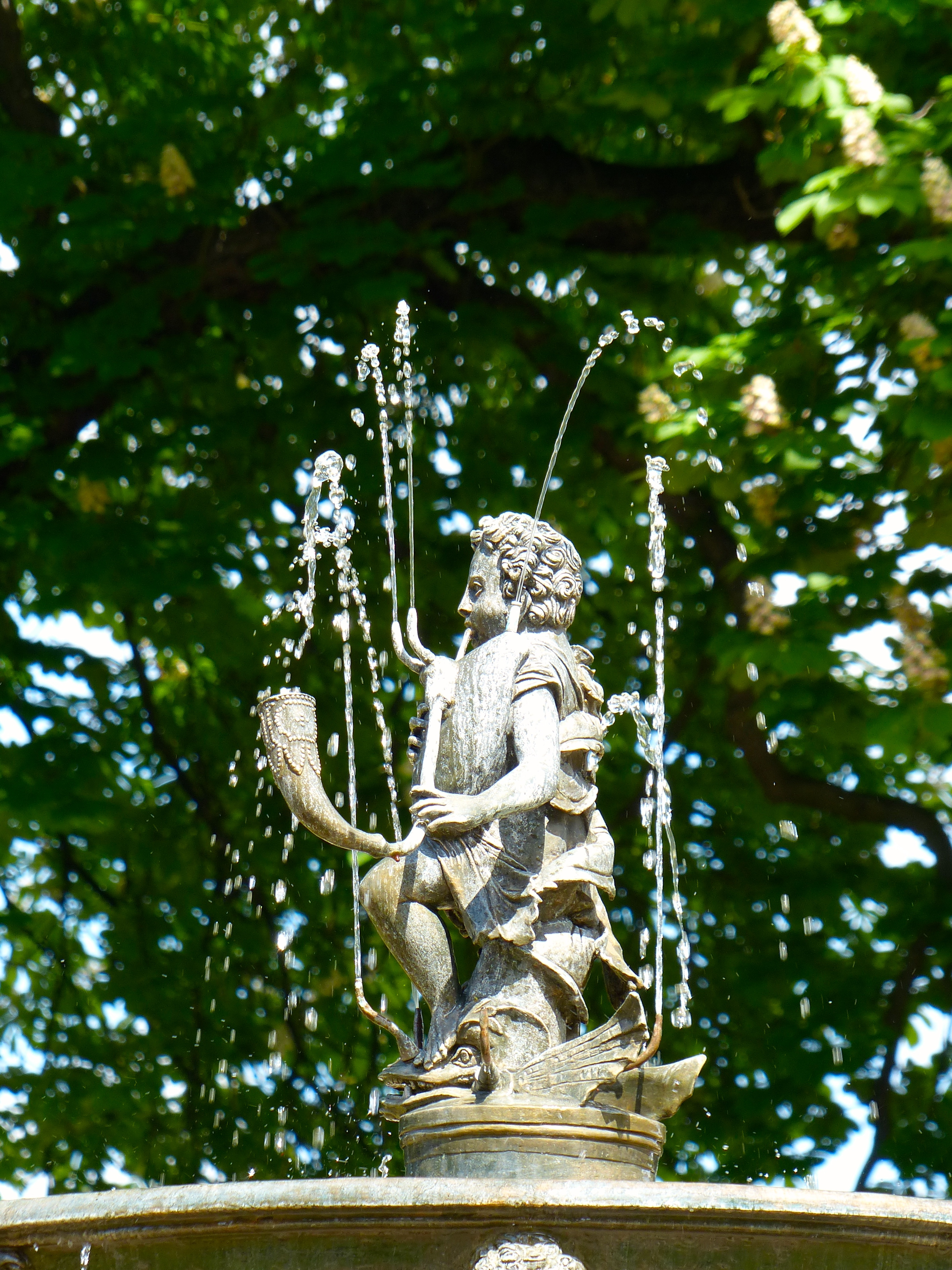 Prague Castle: Singing Fountain